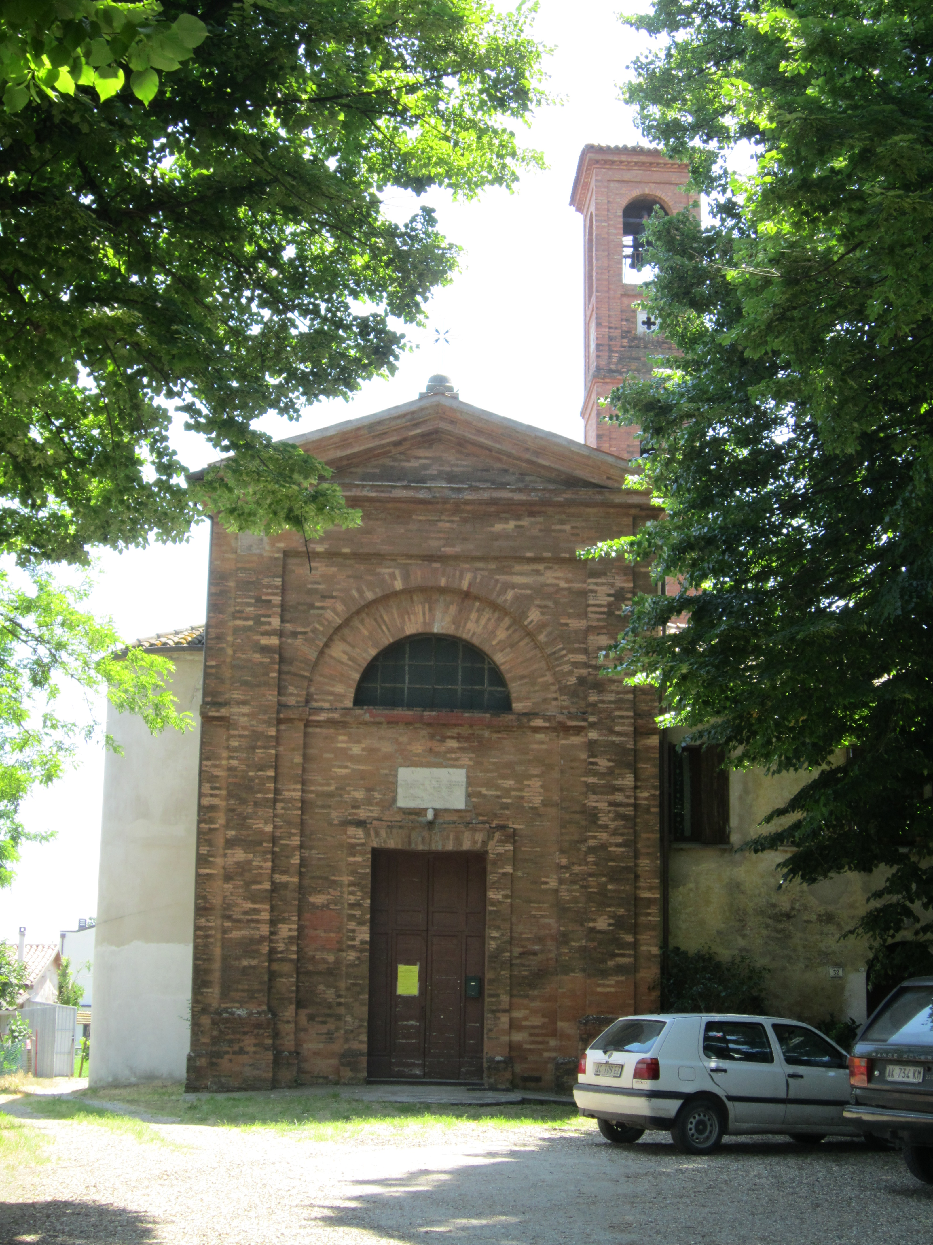 Chiesa di Poggio, foto propria